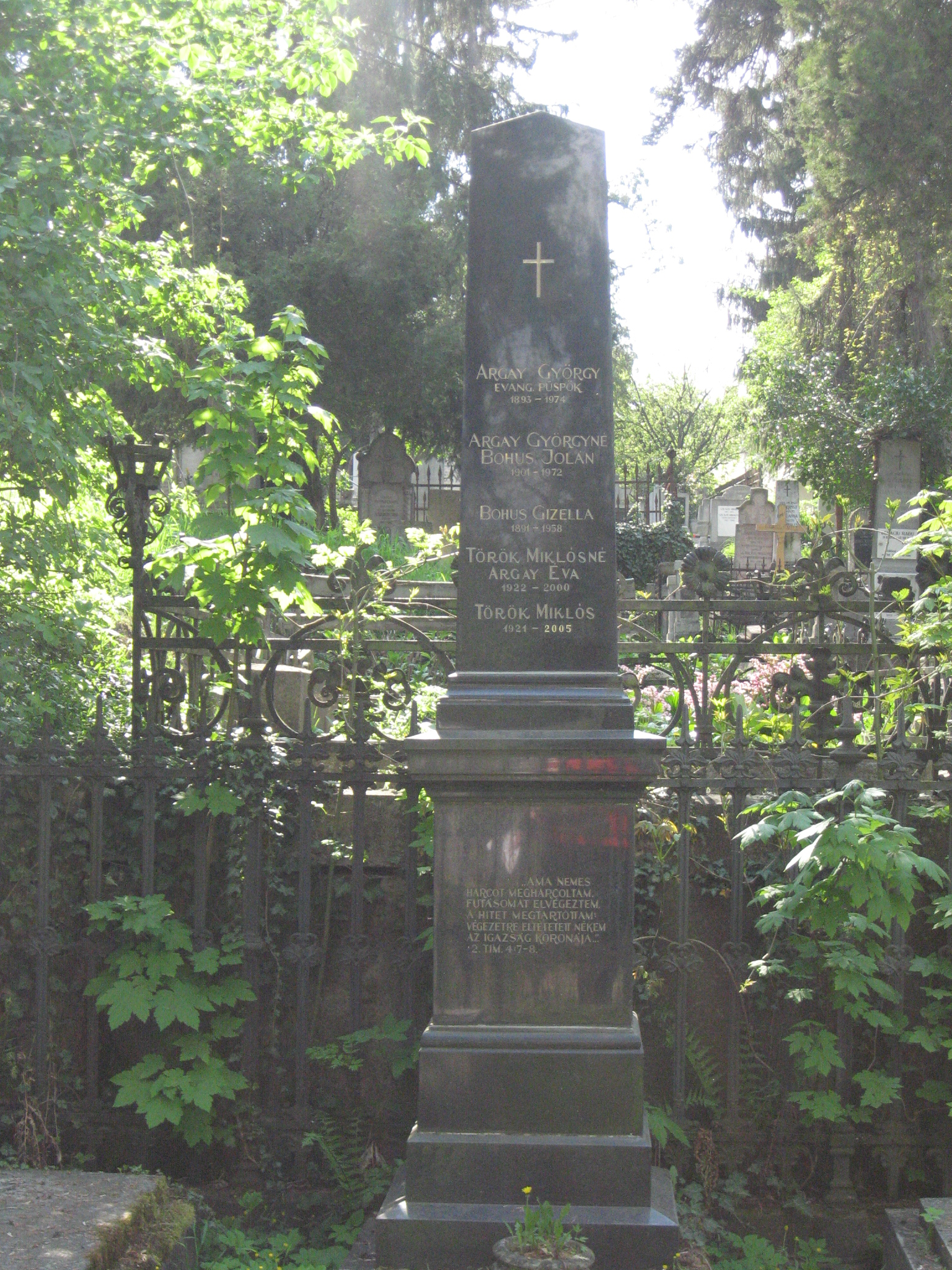 Argay György sírja a kolozsvári Házsongárdi temetőben.